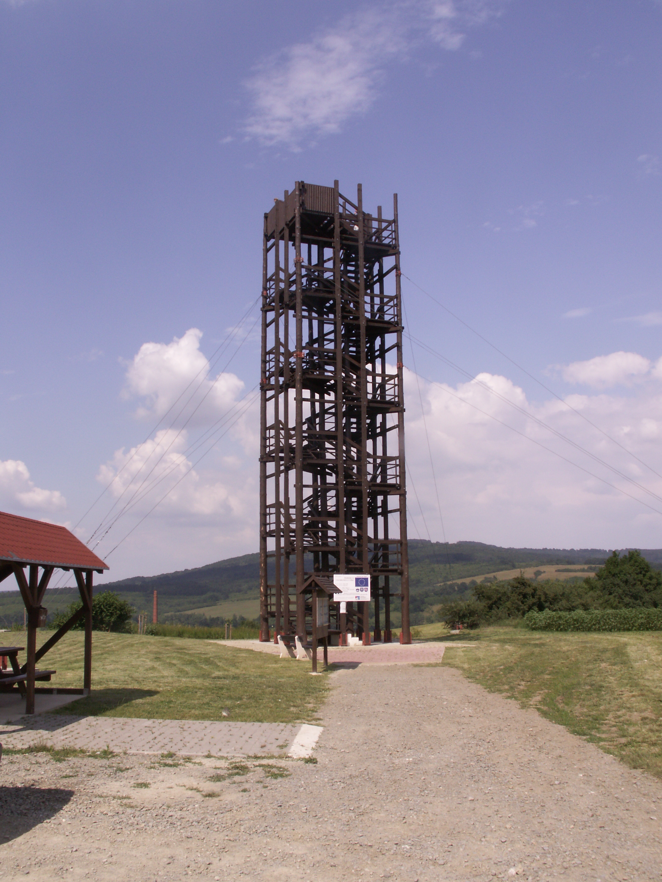 rozhledna Drahy u Javorníku (okres Hodonín)